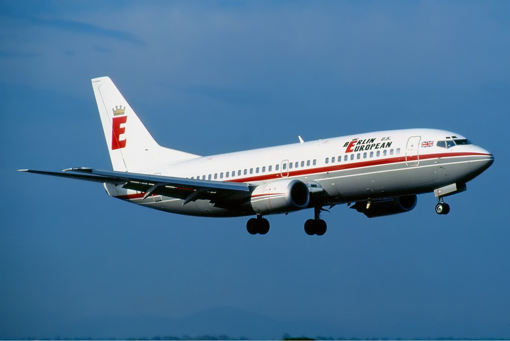 Berlin European UK Boeing 737-300